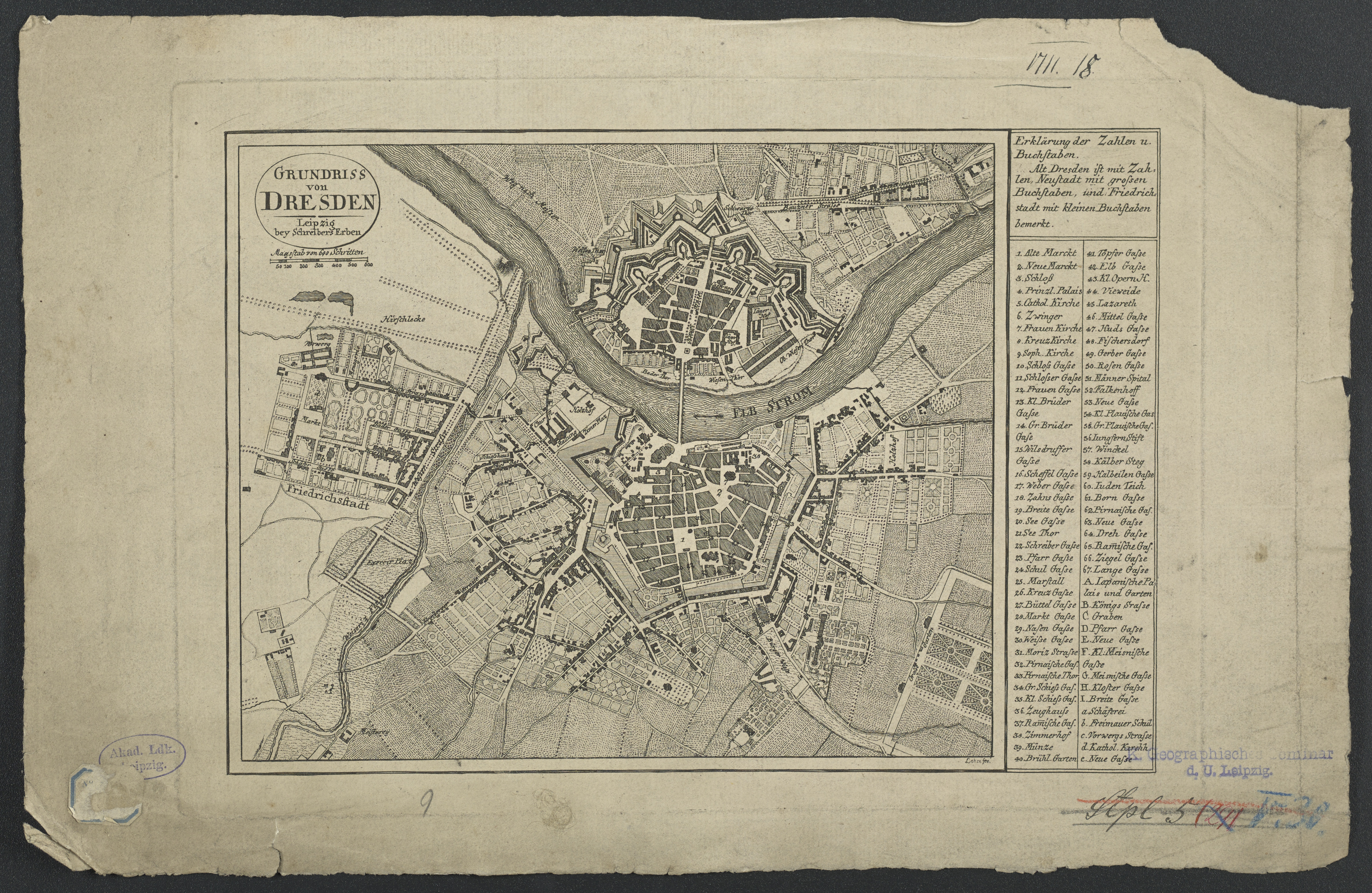 1 Kt. : unkolor. (22 x 18 cm); Koordinaten E 13°42'39"-E 13°45'53"/N 51°03'55"-N 51°02'10" ; Maßstab in graph. Form (Schritte). - Titelkartusche und Maßstab oben links. - Erkl. auf dem Kartenrahmen